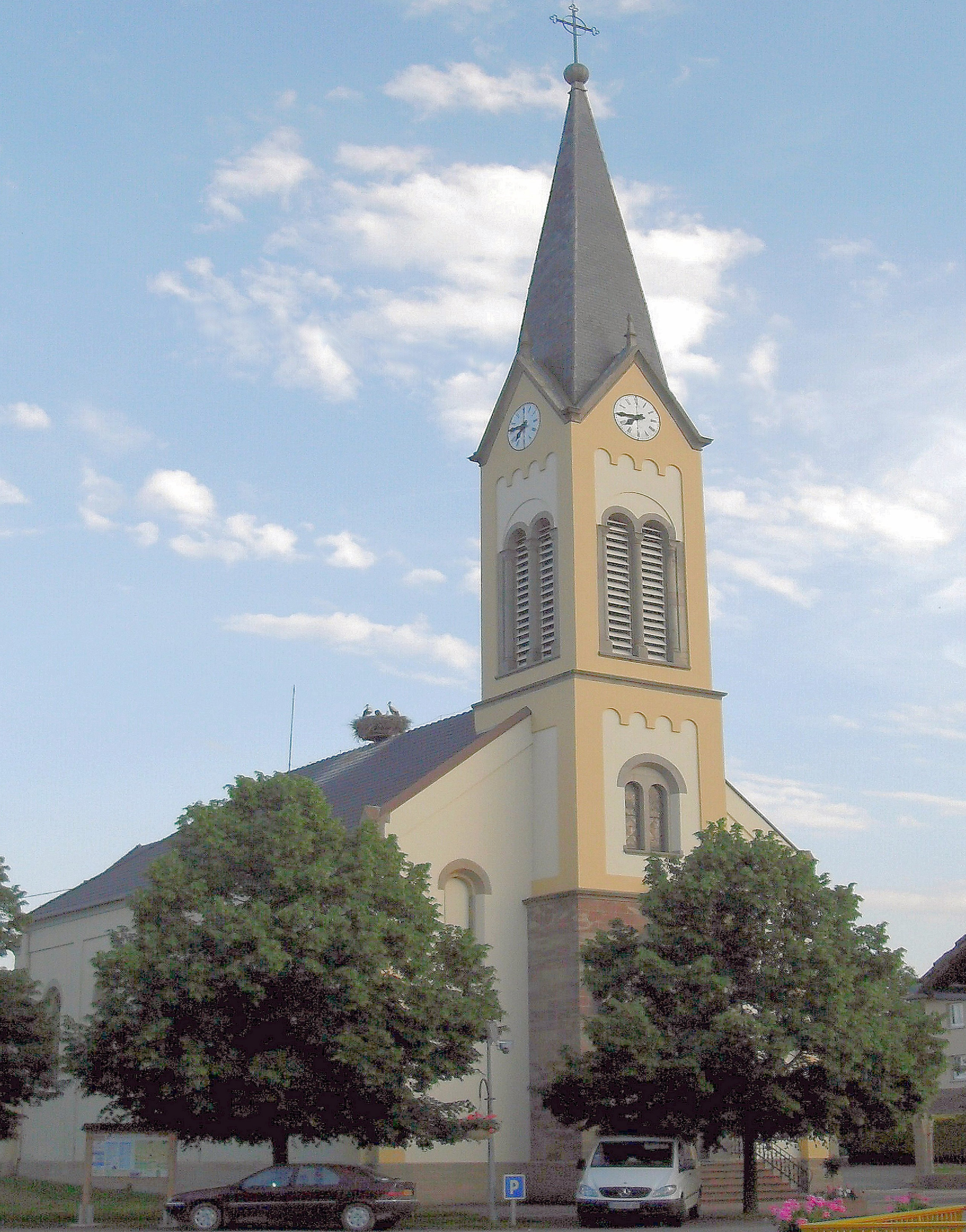 L'église Sainte-Anne à Hindlingen